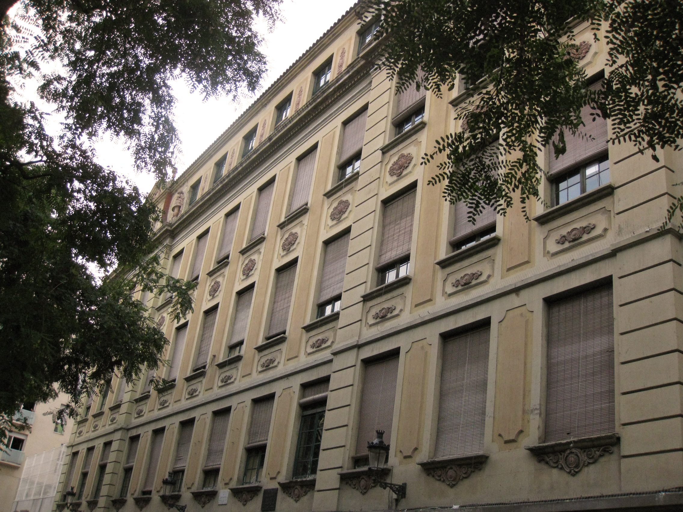 Escola Milà i Fontanals, al Raval de Barcelona. Edifici de Josep Goday (1921-1931). Actualment acull també l'IES Miquel Tarradell. Detall de la façana del carrer del Carme.